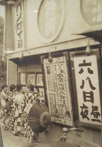 滋賀県八日市市（現在の東近江市）のバンザイ館（のちの八日市協映）、1936年の写真。